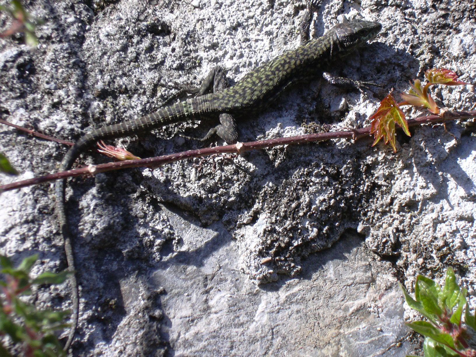 Lucertola, Bellagio, Lago di Como